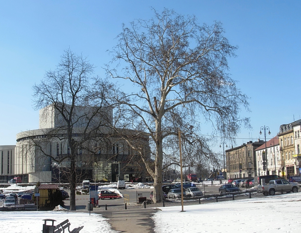 platan klonolistny – pomnik przyrody na placu Teatralnym w Bydgoszczy